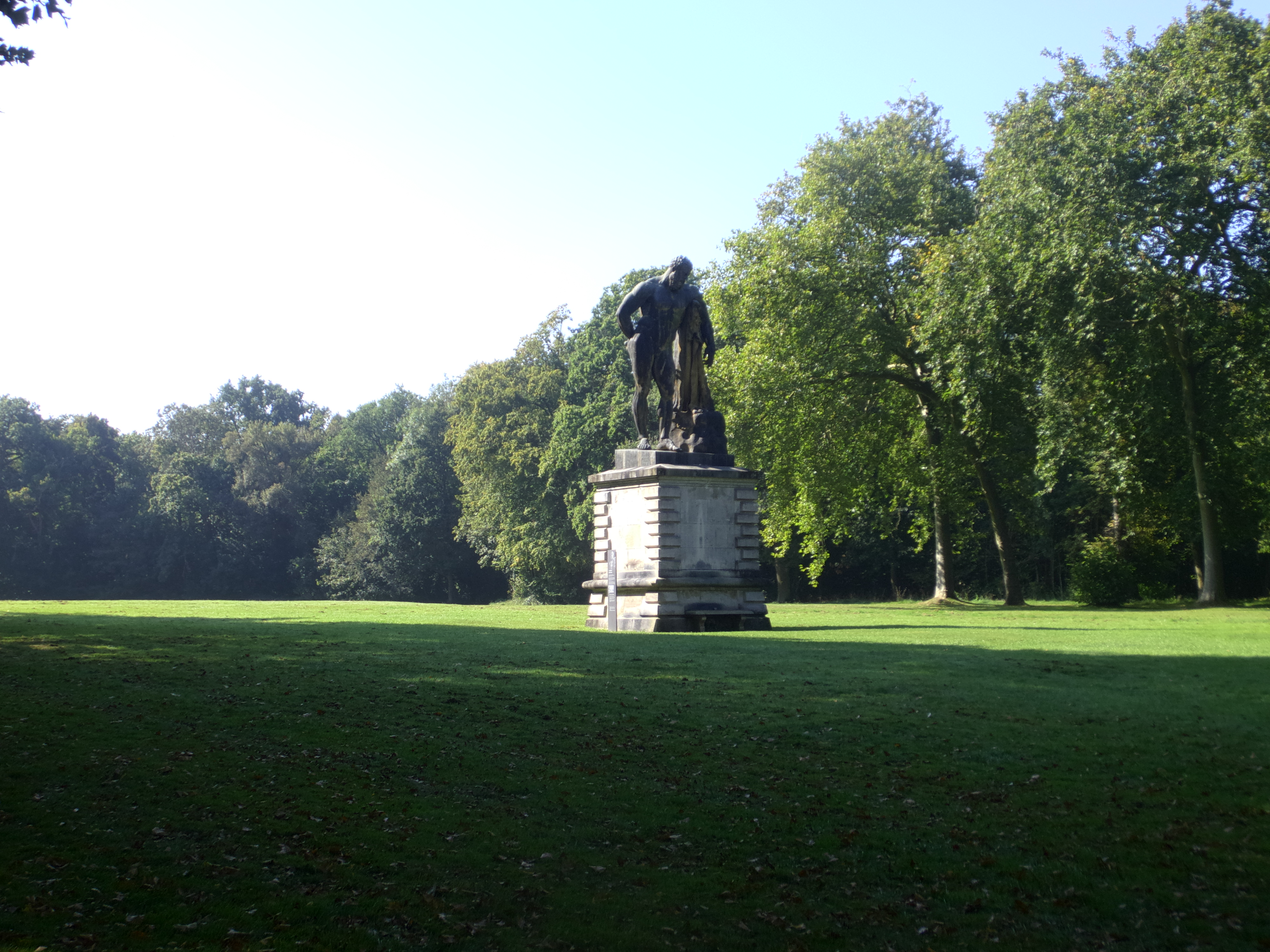 statue d'Hercule située au fond des jardins de vaux-le-vicomte